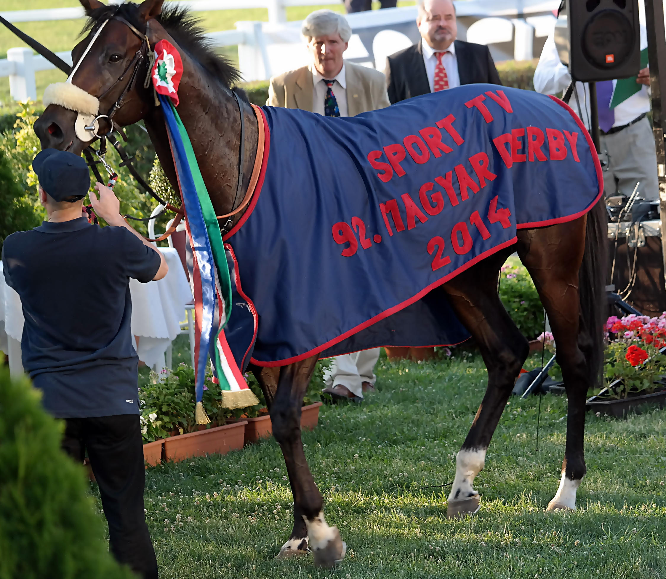 A 92. Magyar Derby győztes lova: Kilword. Kincsem Park.